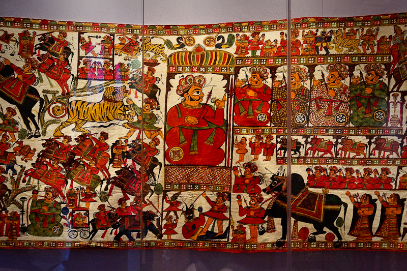 Pabuji-Verteldoek (4669-1) Pabuji par by Jaravcand Josi of Bhilwara This very fine par is dated 1938 A.D. The epic of Pabuji is an oral epic in the Rajasthani language that tells of the deeds of the folk hero-deity Pabuji Rathor, who lived in the 14th century.